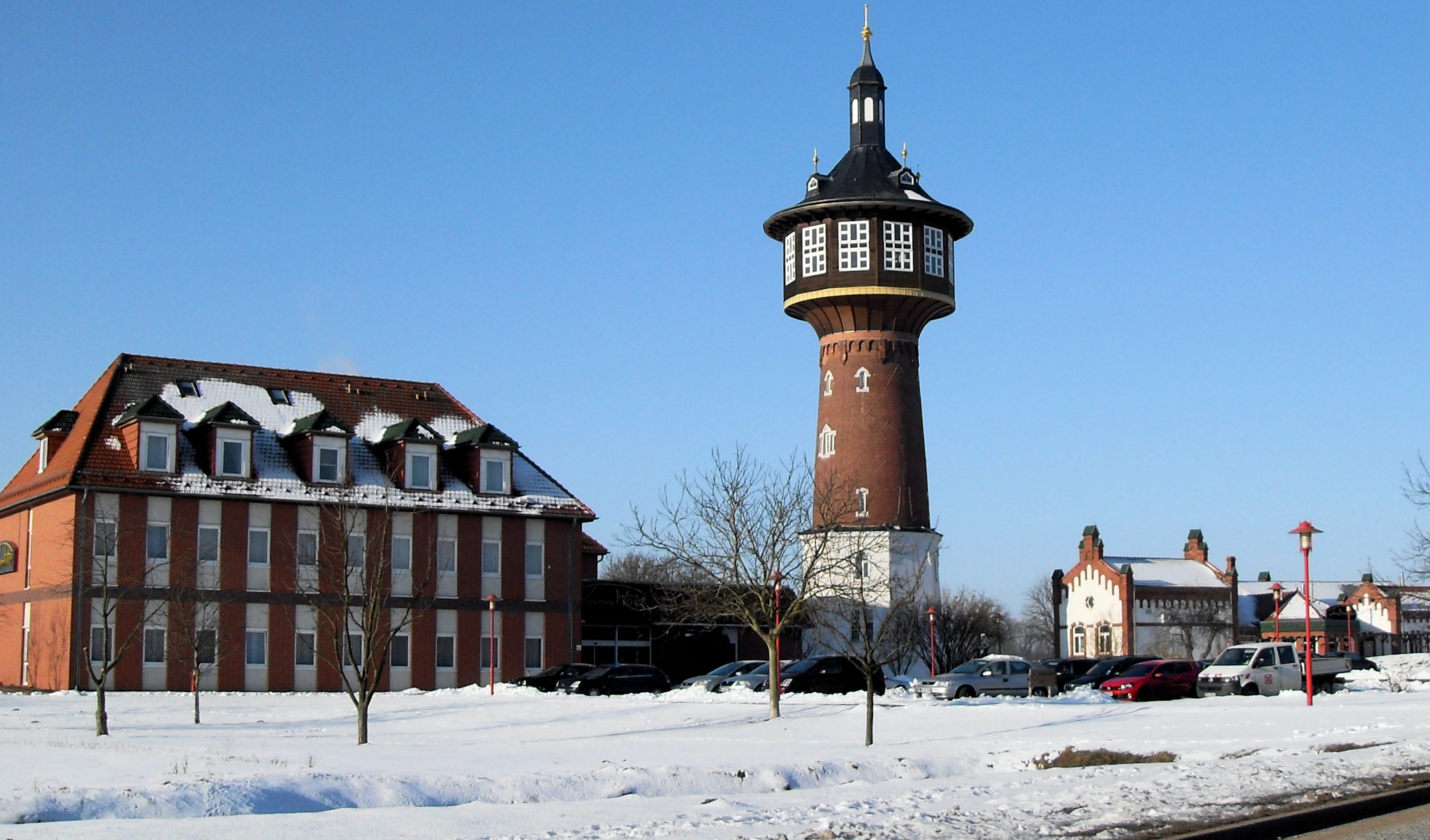 Wasserturm und „Turmhotel“ in SchwedtOder